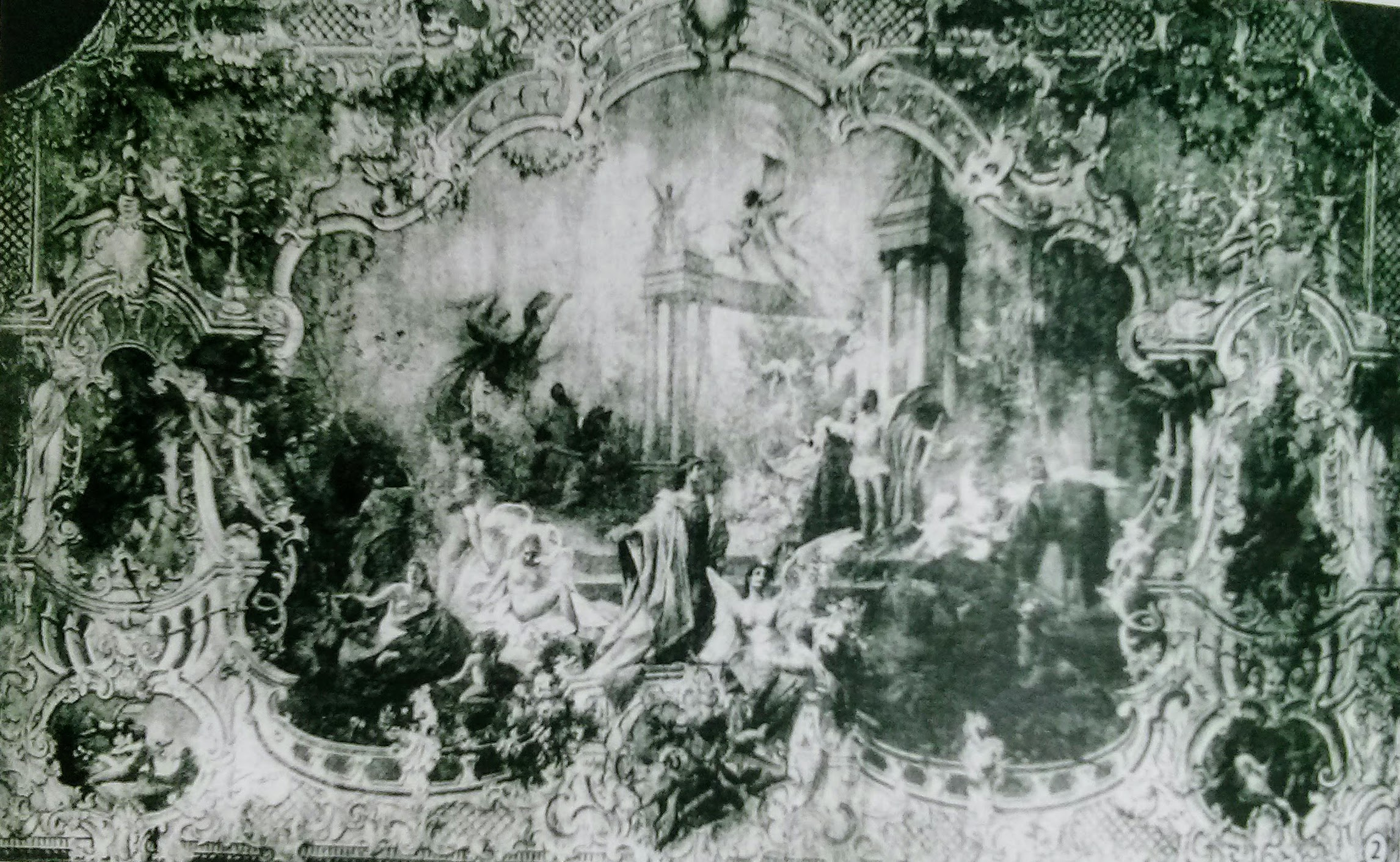 Eduard Weith, původní malovaná opona, Nové německé divadlo v Praze, 1888.